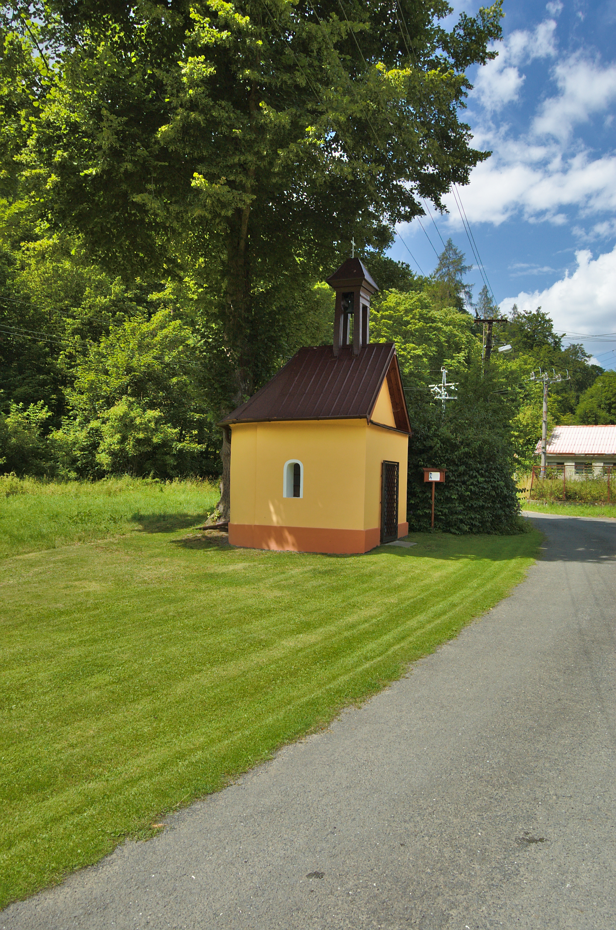 Kaplička, Okluky, Malé Hradisko, okres Prostějov